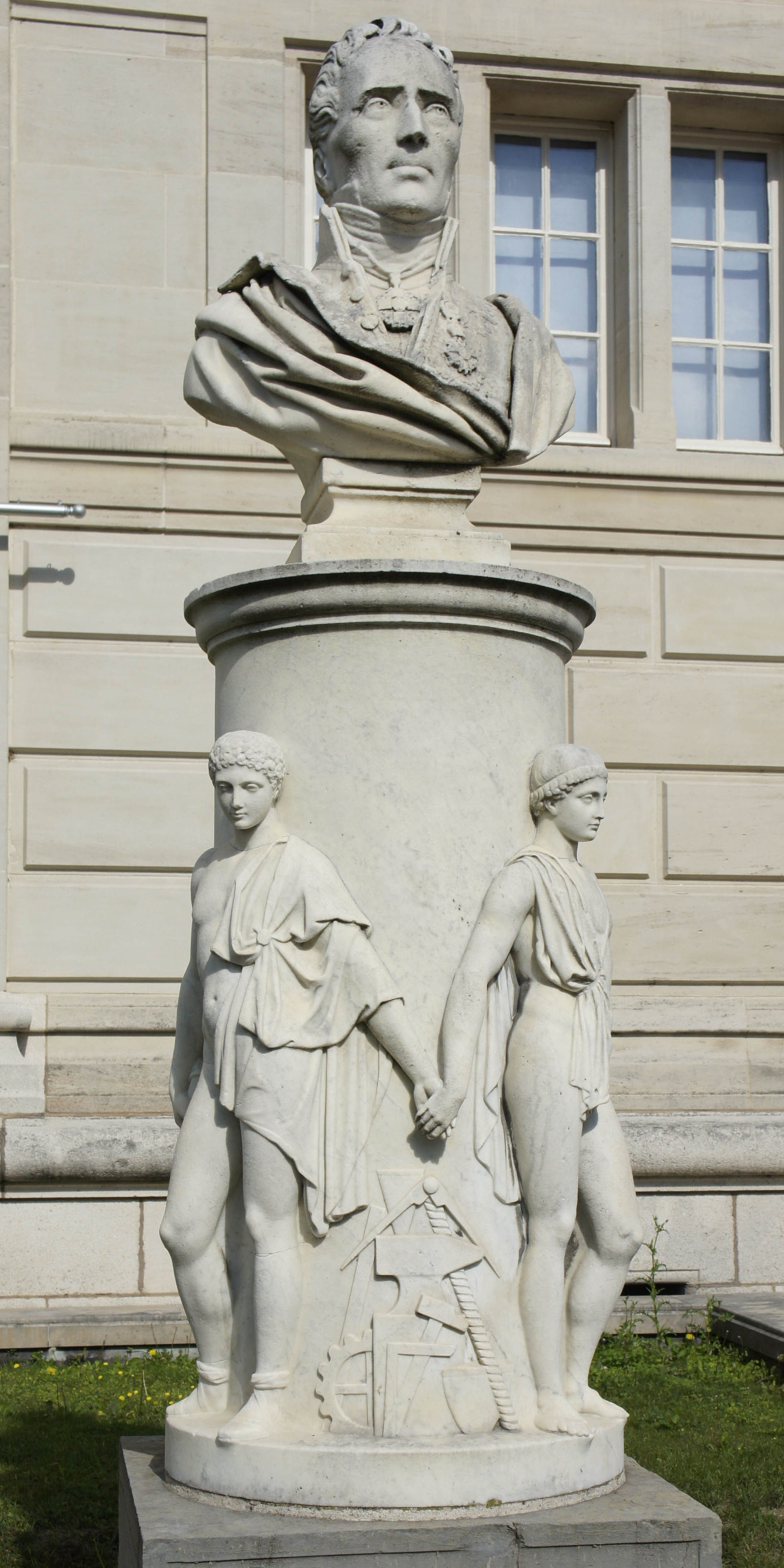 Vue de la statue du préfet Claude Laurent Bourgeois de Jessaint, elle est l'oeuvre de Antoine Desboeufs, se trouve en face de l'hôtel de préfecture, devant les archives départementales, elle est recensée comme patrimoine natinal sous le n° : IA51000422 . This building is indexed in the Base Mérimée, a database of architectural heritage maintained by the French Ministry of Culture, under the references IA51000422 and statue .